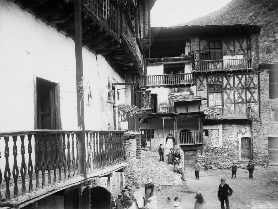 Imatge